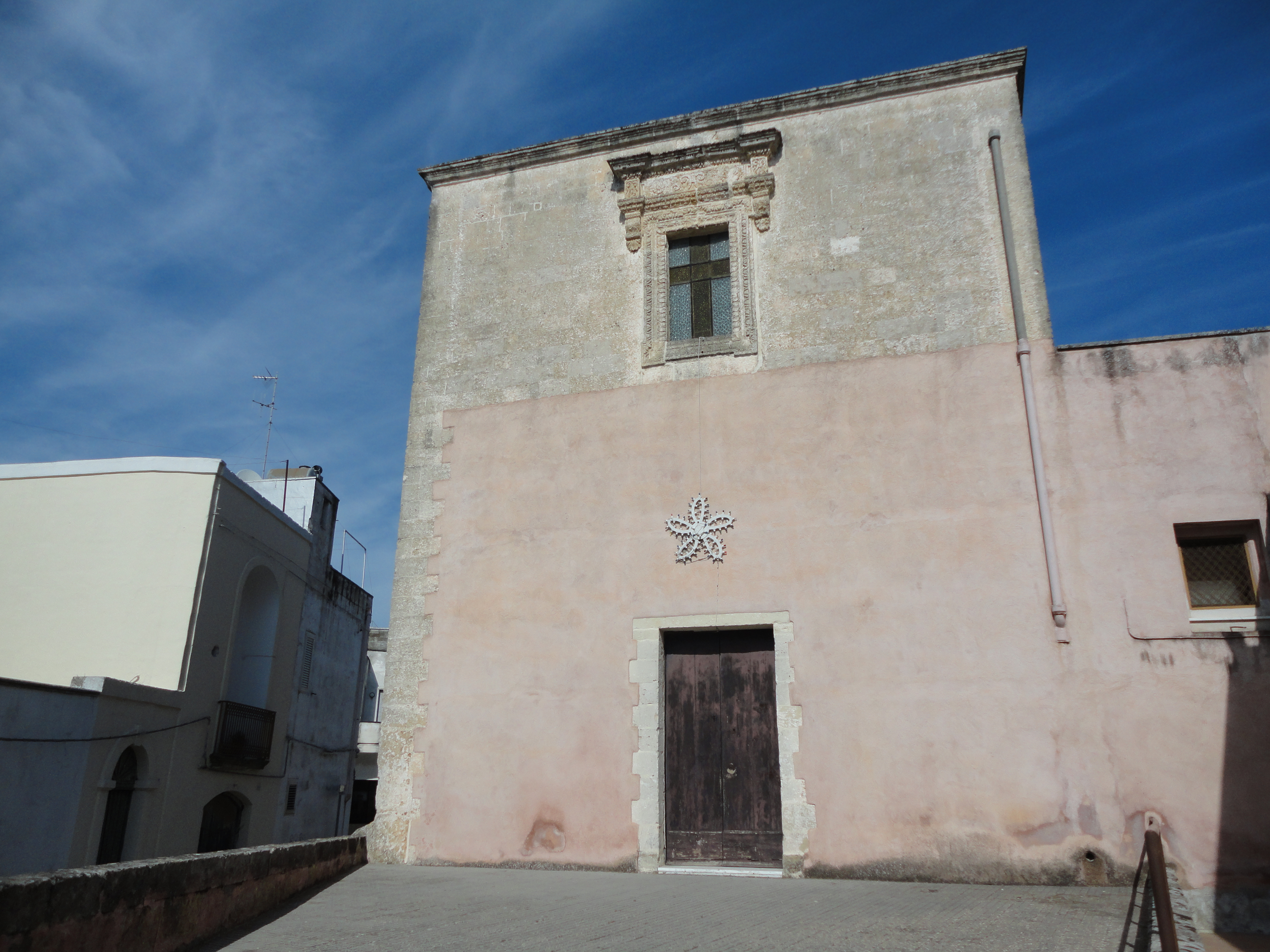 Cappella di San Gaetano Tutino, Tricase, Lecce